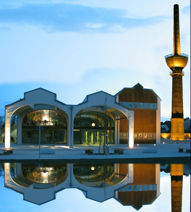 Gempt-Halle in Lengerich spiegelt sich.